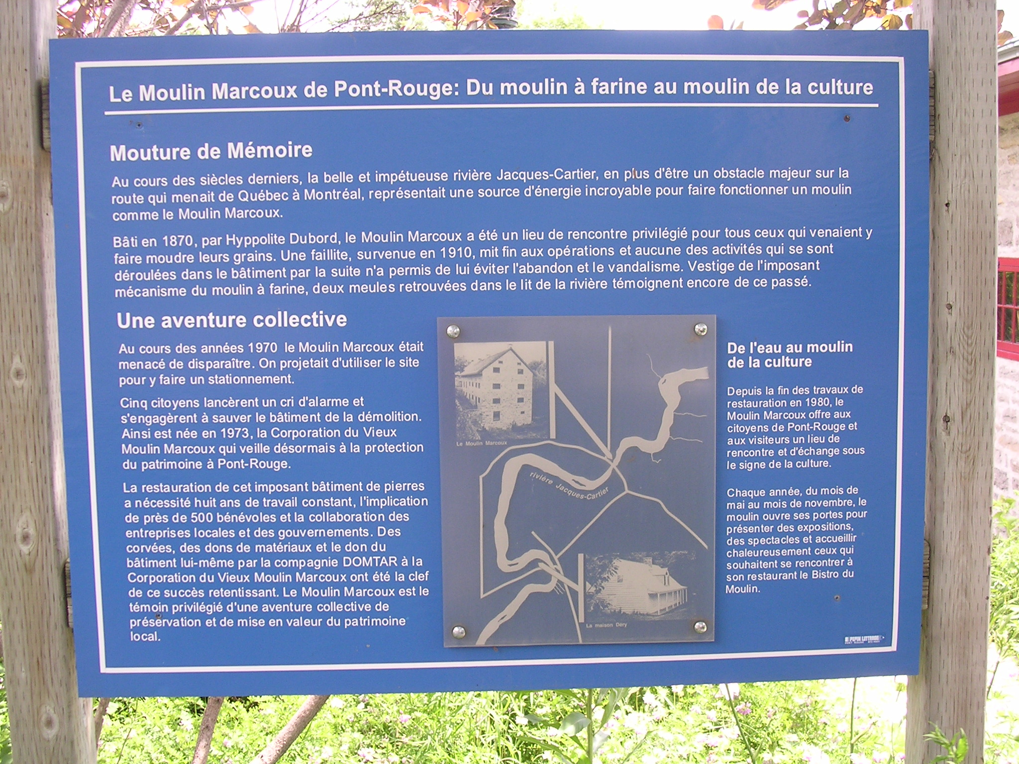 Panneau d'interprétation du moulin Marcoux, situé à Pont-Rouge (région de la Capitale-Nationale, Québec). Il n'a plus ses mécanismes, il est maintenant utilisé comme centre culturel. Moulin à eau; moulin à farine; salle de spectacles; salles d'exposition; café-bistro.